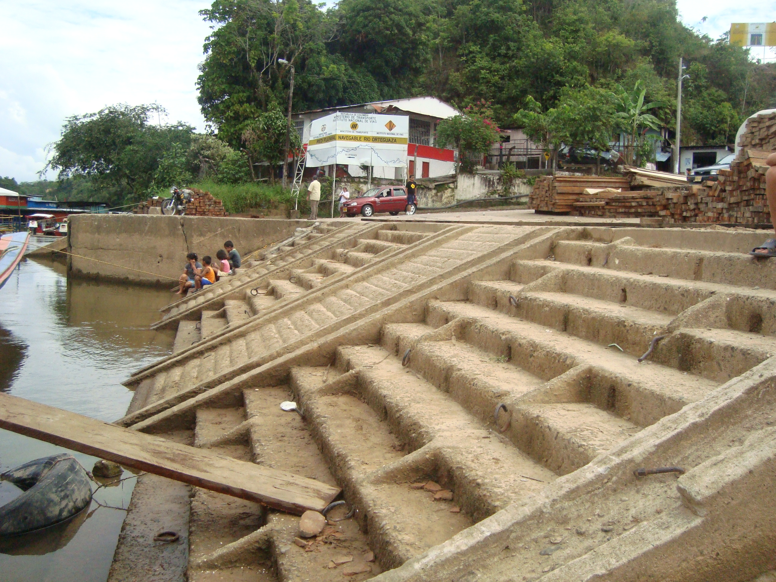 Puerto Arango, río Orteguaza en Florencia (Caquetá)